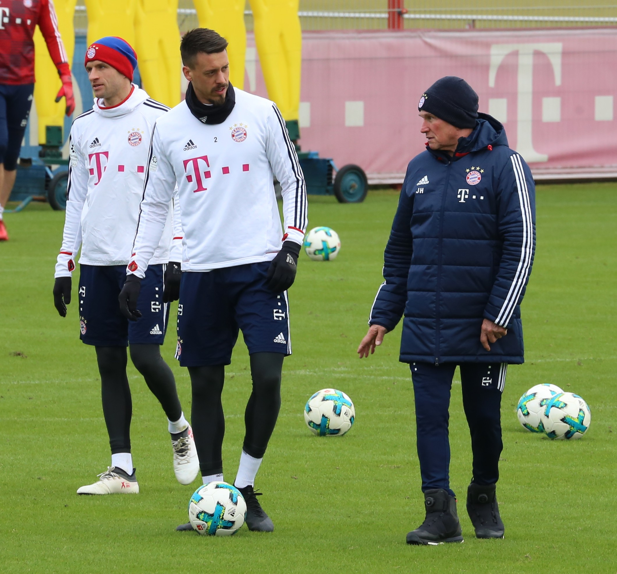 Thomas Müller, Sandro Wagner und Jupp Heynckes beim Training auf dem Gelände des FC Bayern München (Januar 2018)